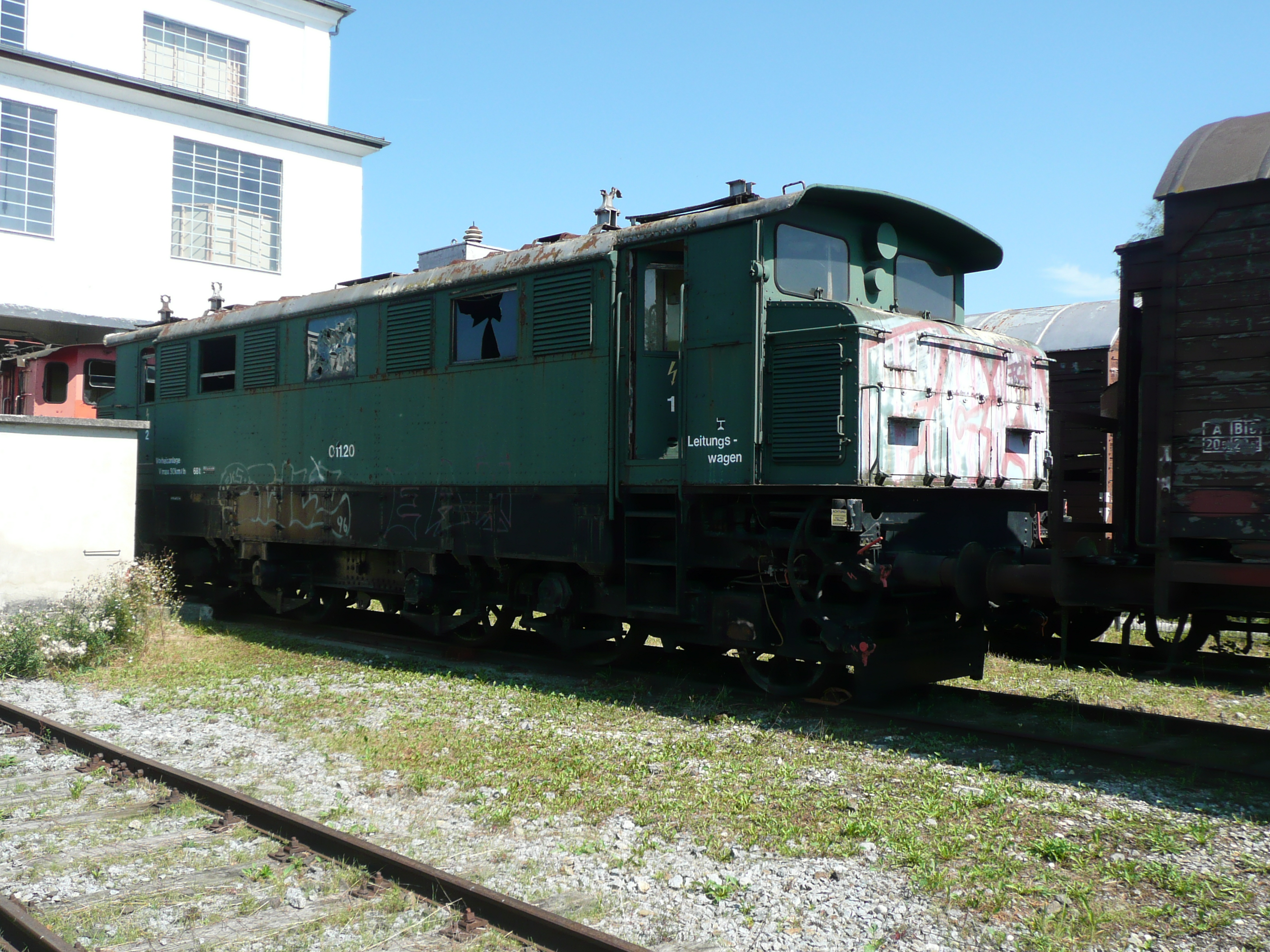 Eine erhaltene 1670 (ehemalige fahrbare Vorheizanlage) im Eisenbahnmuseum Ampflwang